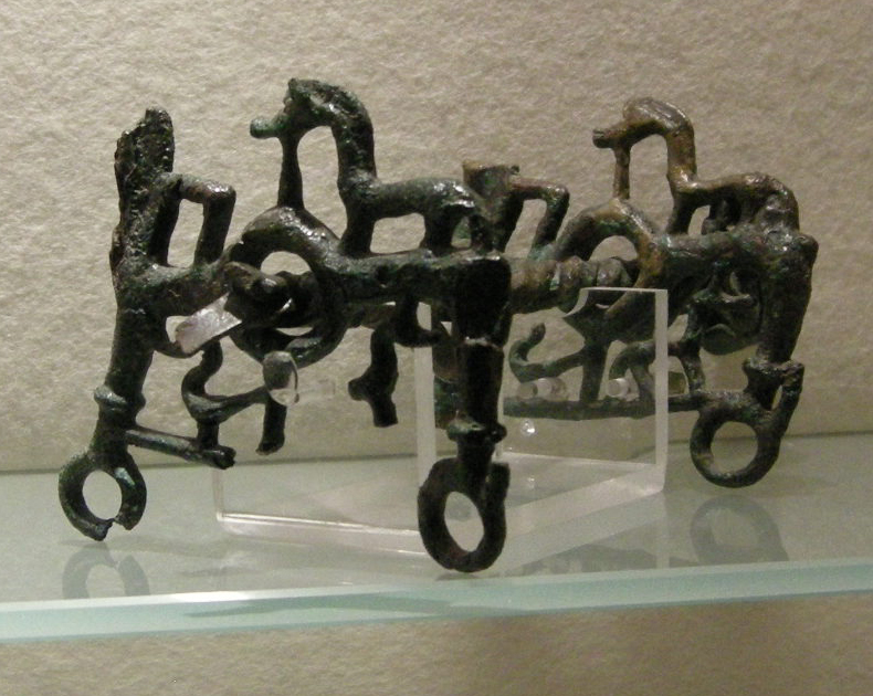 Museo guarnacci, reperti della tomba manetti